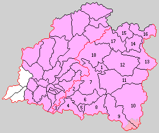 愛知県東加茂郡の町村制時点の町村。